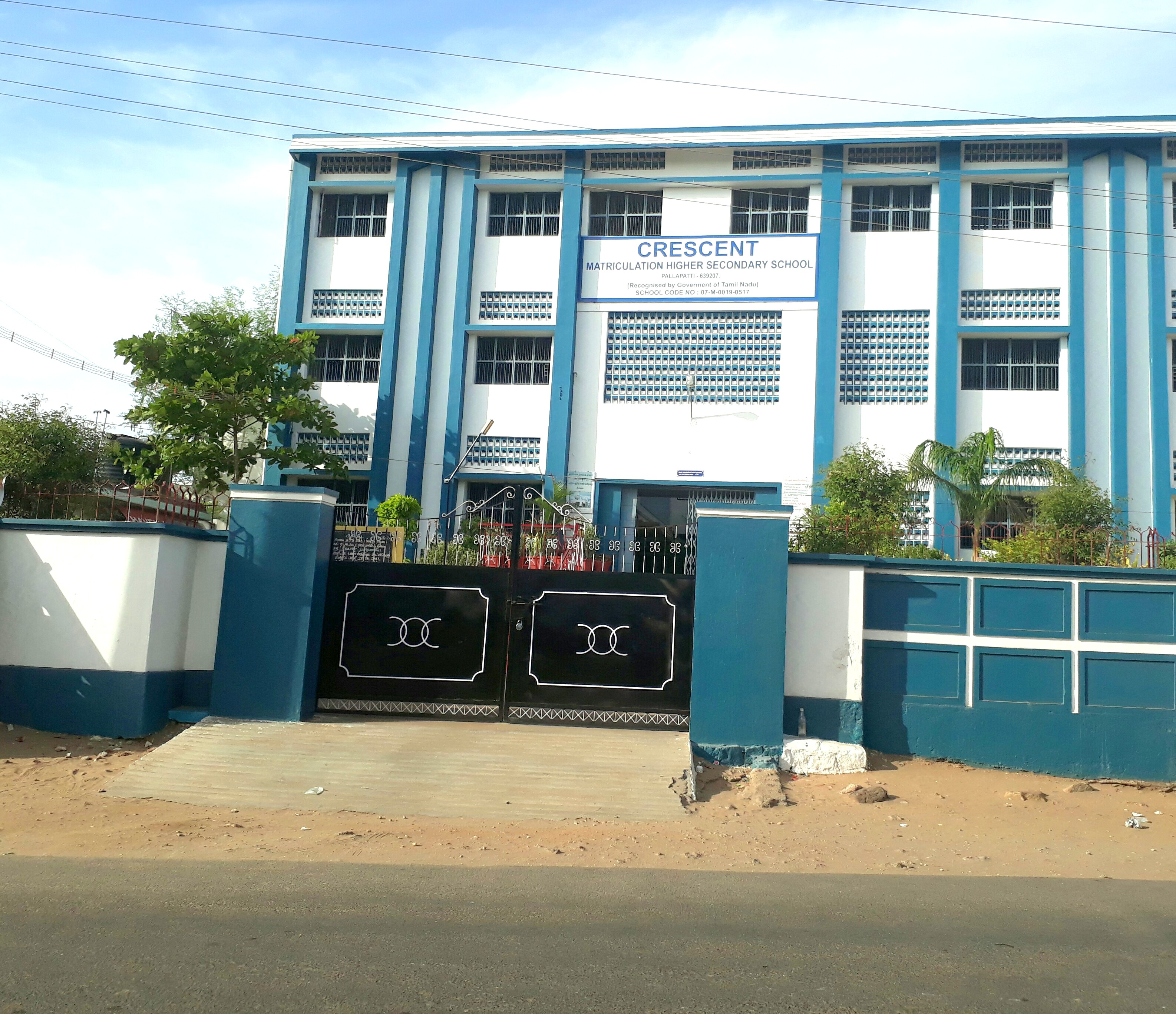 கிரஸெண்ட் மெட்ரிக் மேல்நிலைப் பள்ளியின் முகப்புத் தோற்றம்